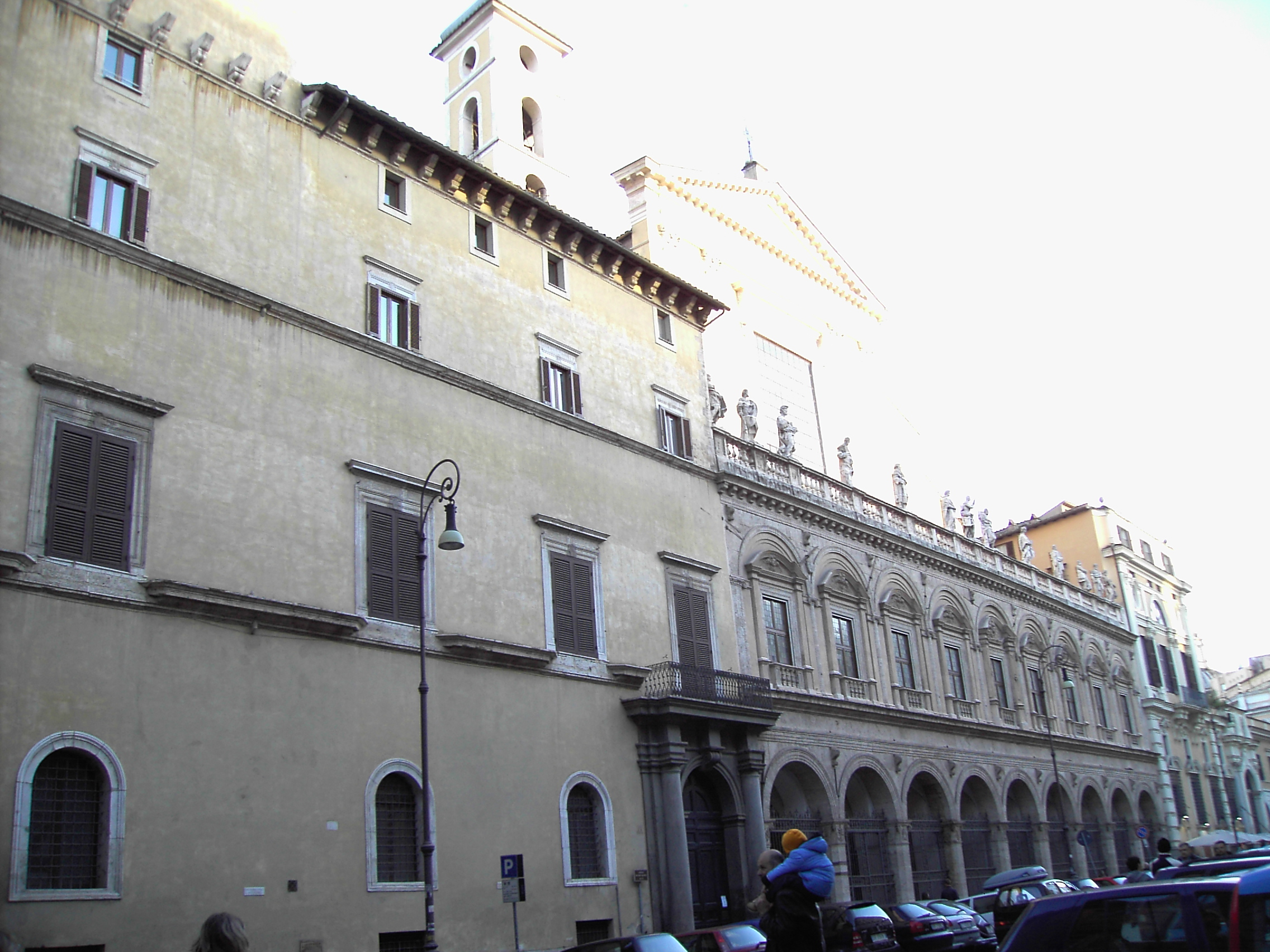 Roma, piazza Santi Apostoli. Da sinistra a destra: palazzo SS Apostoli, basilica dei SS Apostoli e palazzo Colonna. by Lalupa.